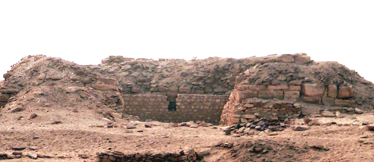 Vue de la pyramide Lepsius XXIV